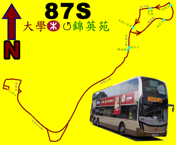 中文（香港）: 九巴87S線(黃昏班次)的走線圖